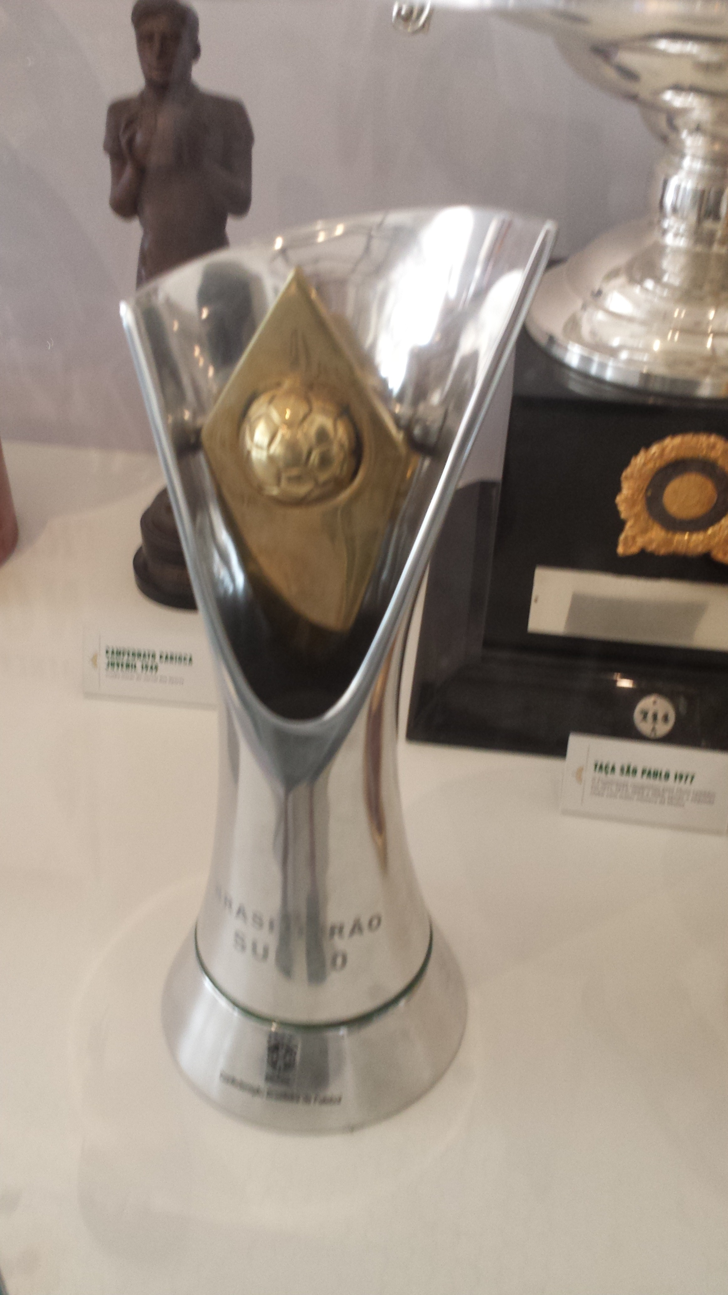 Taça do Campeonato Brasileiro de Futebol Sub-20 de 2015 conquistado pelo Fluminense Football Club, a 1ª edição desta competição sob organização da Confederação Brasileira de Futebol (CBF), tendo sido disputada entre 3 de junho e 2 de setembro de 2015.